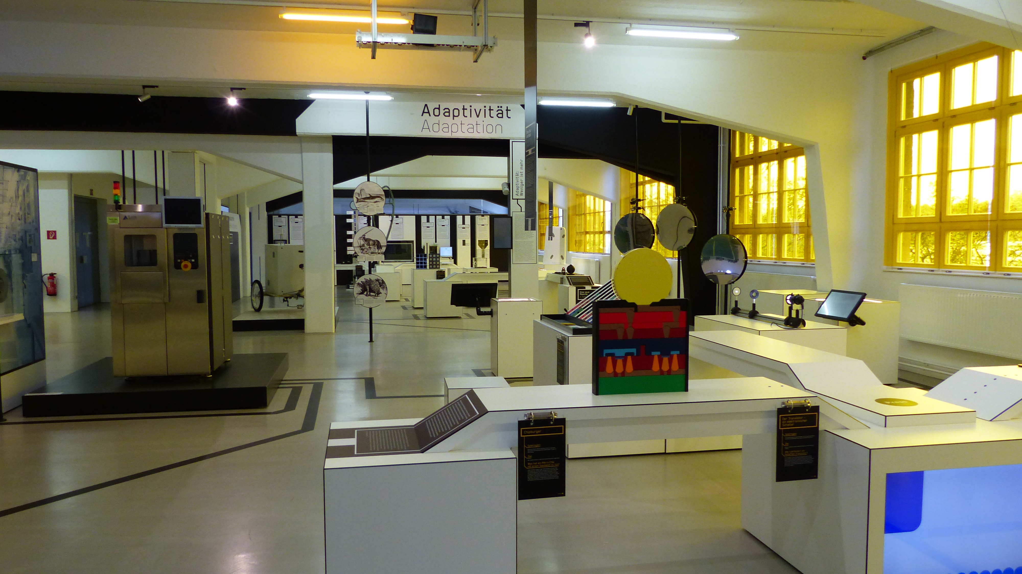 Ausstellung: "Cool X. Energie in einer digitalen Welt", in den Technischen Sammlungen Dresden